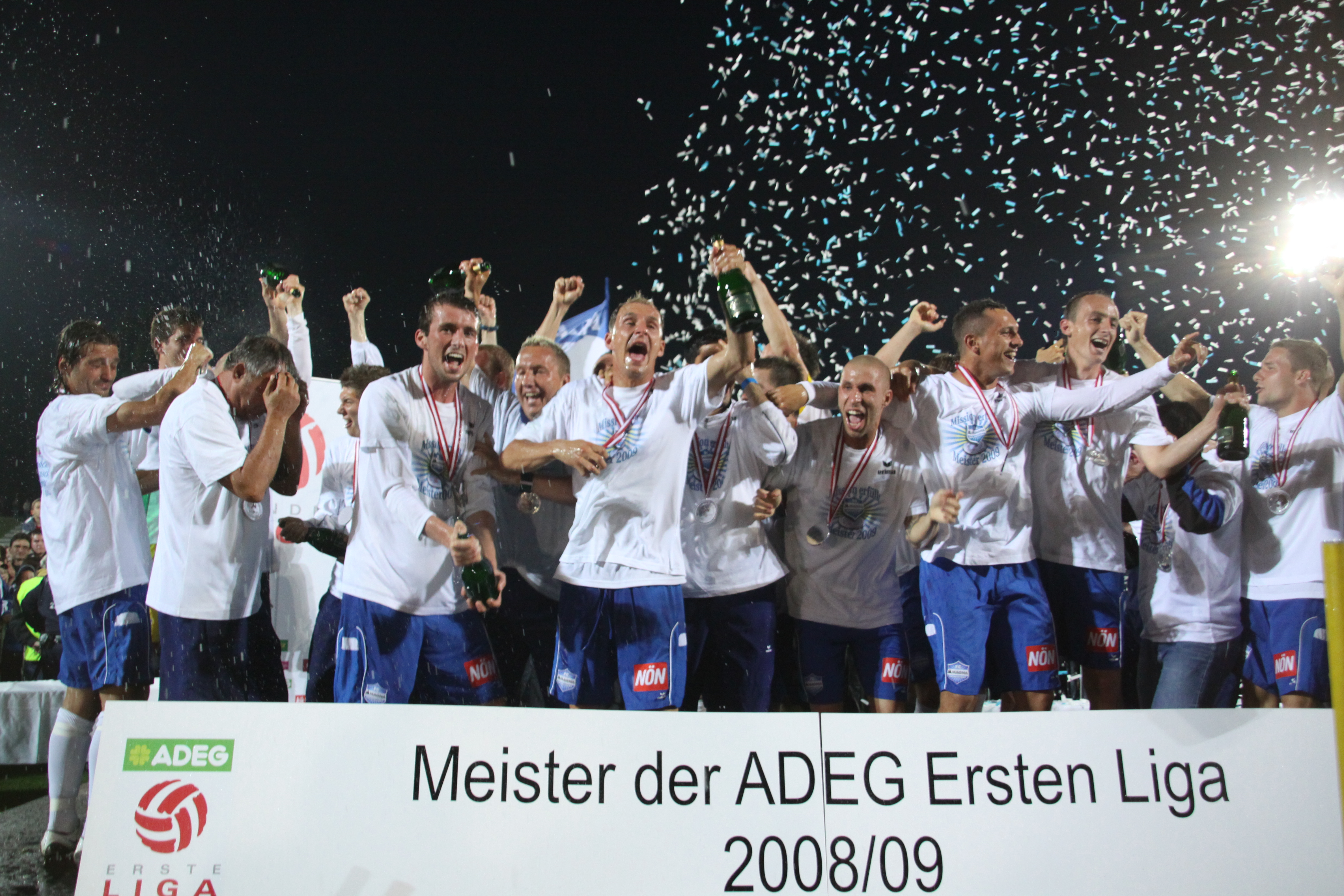 SC Magna Wiener Neustadt - Meisterfeier der österreichischen Ersten Liga Saison 2008/09